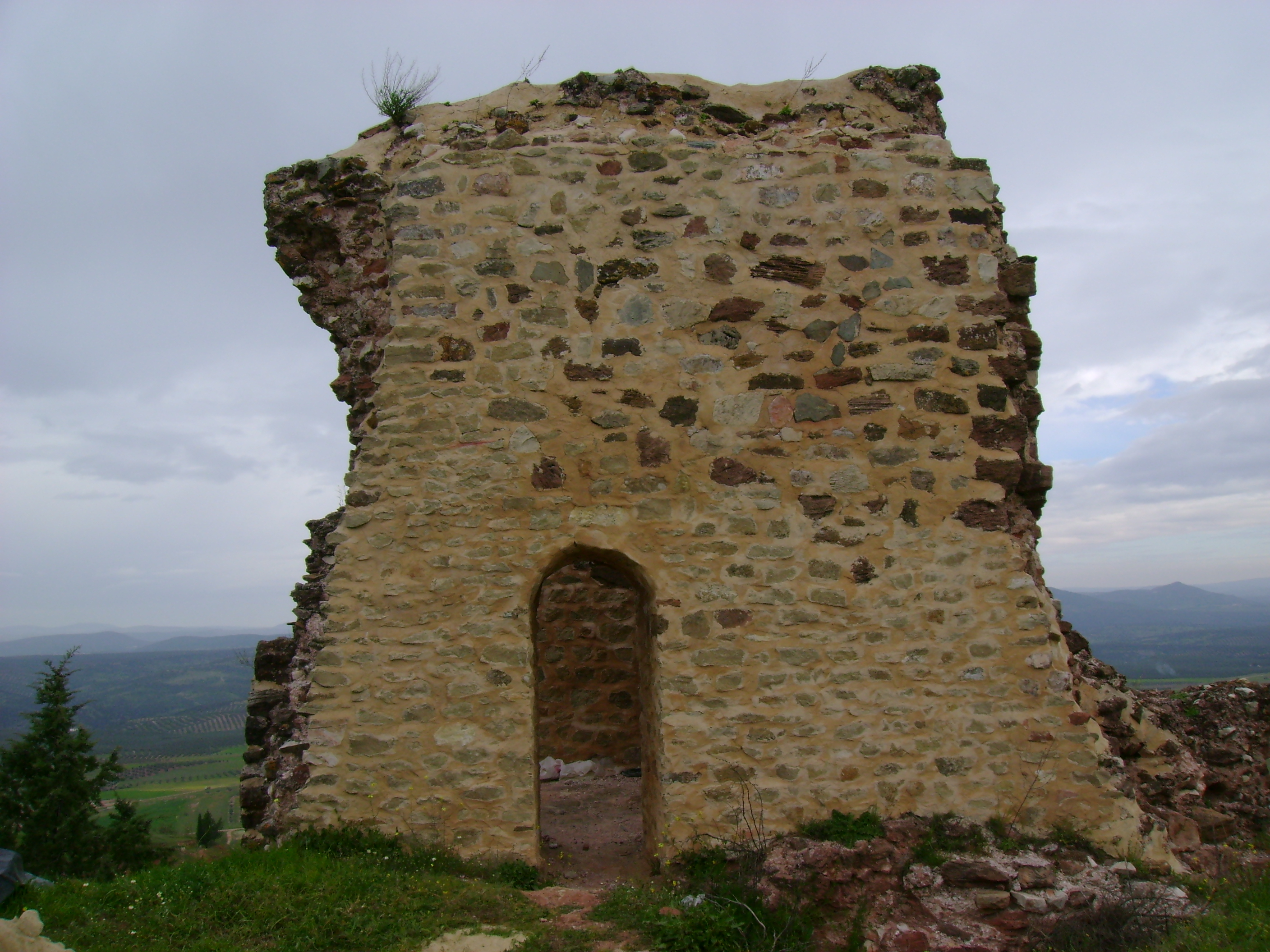 Torre del castillo de Santisteban del Puerto.